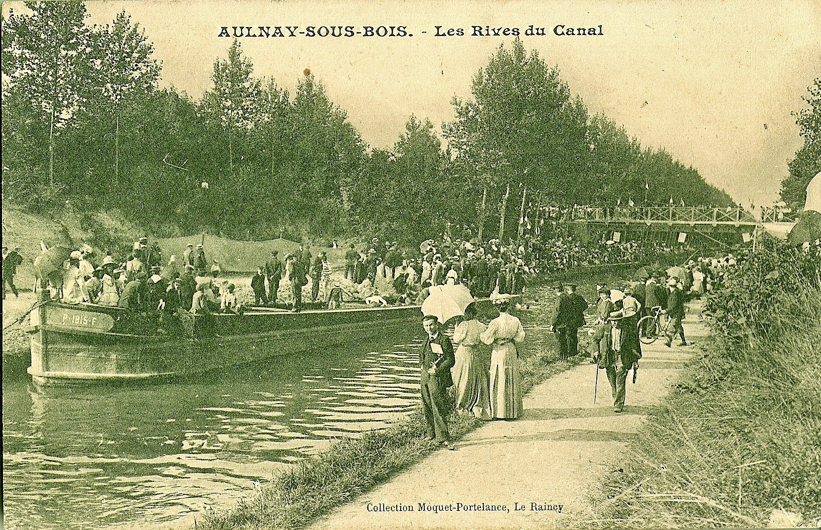 carte postale ancienne éditée par Moquet-Portelance au RaincyAULNAY-SOUS-BOIS - Les rives du Canal